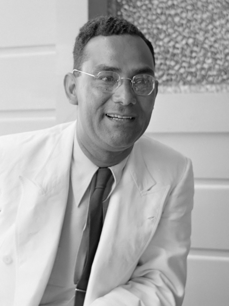 Nederlandse Antillen en Suriname ten tijde van het koninklijk bezoek van koningin Juliana en prins Bernhard in 1955. Johan Ferrier op het terras van het Palacehotel op het Gouvernementsplein in Paramaribo 1 oktober 1955